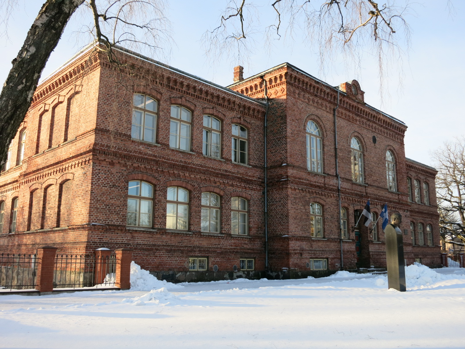 Pärnu Kuninga Tänava Põhikool